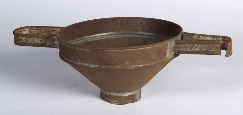 Melkesil av blikk fra perioden 1910-20, innkommet fra Sogndal i Sogn og Fjordane. Diameter 23 cm. Foto Anne-Lise Reinsfelt / Norsk Folkemuseum, NFL.26752.